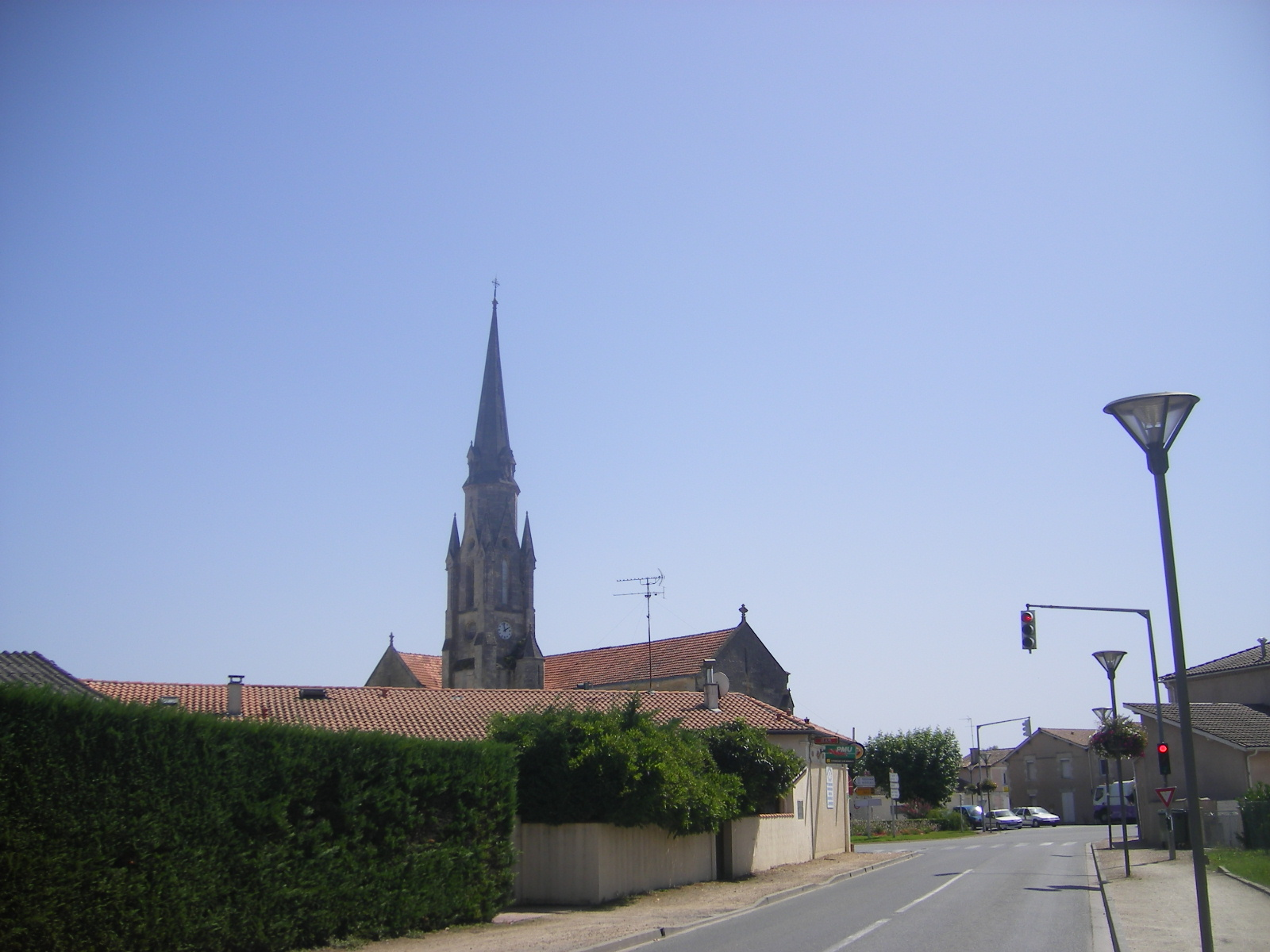 Le Barp